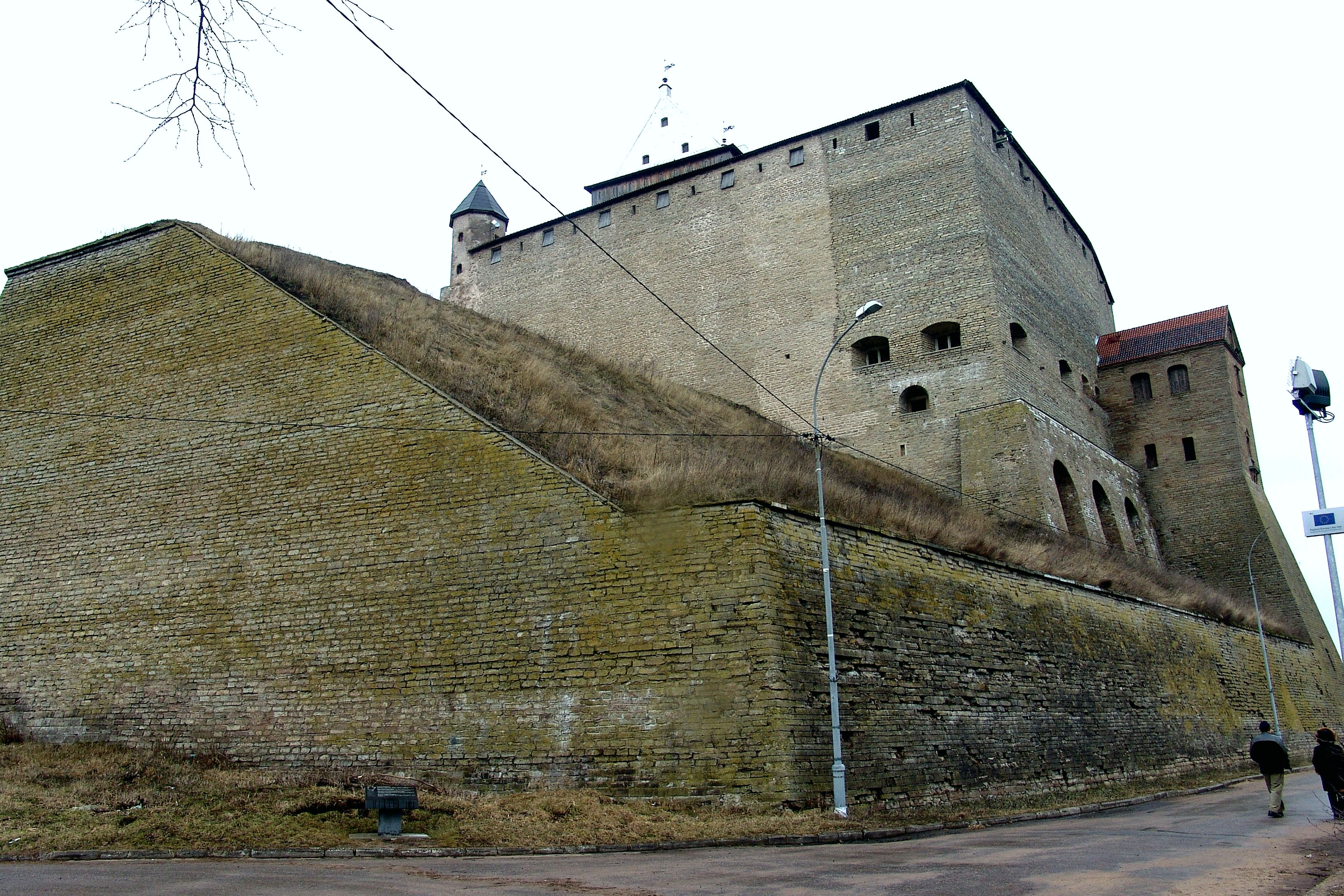 Бастион Спес